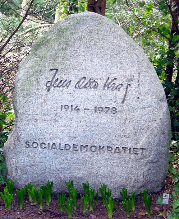 Jens Otto Krag. Gravsten på Vestre Kirkegård, København.